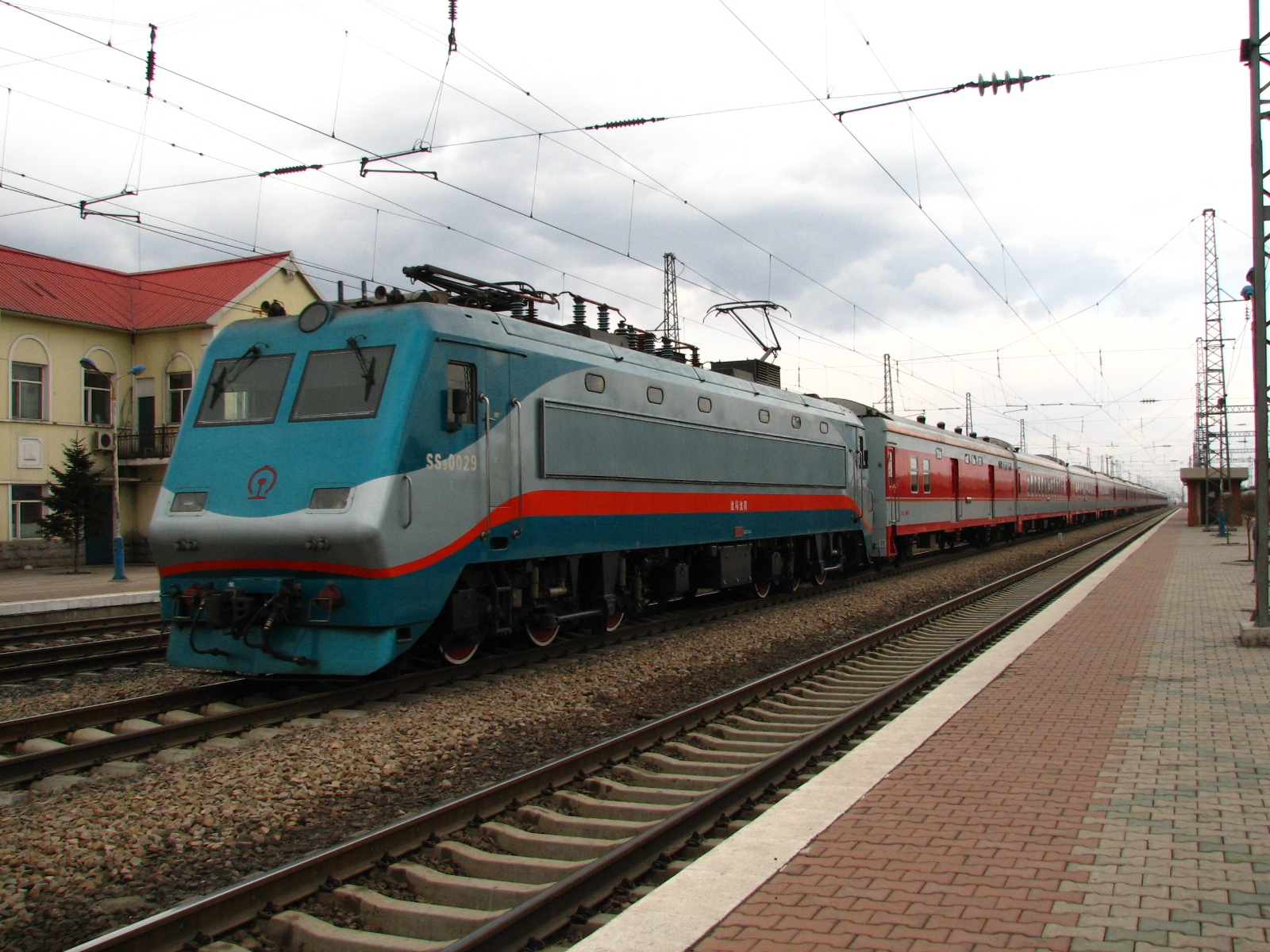 王岗站内K40通过